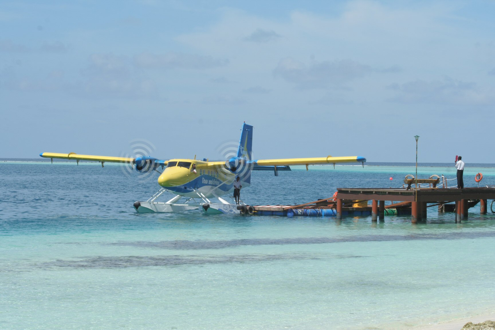 Air Taxi am Hafen von Velidooh